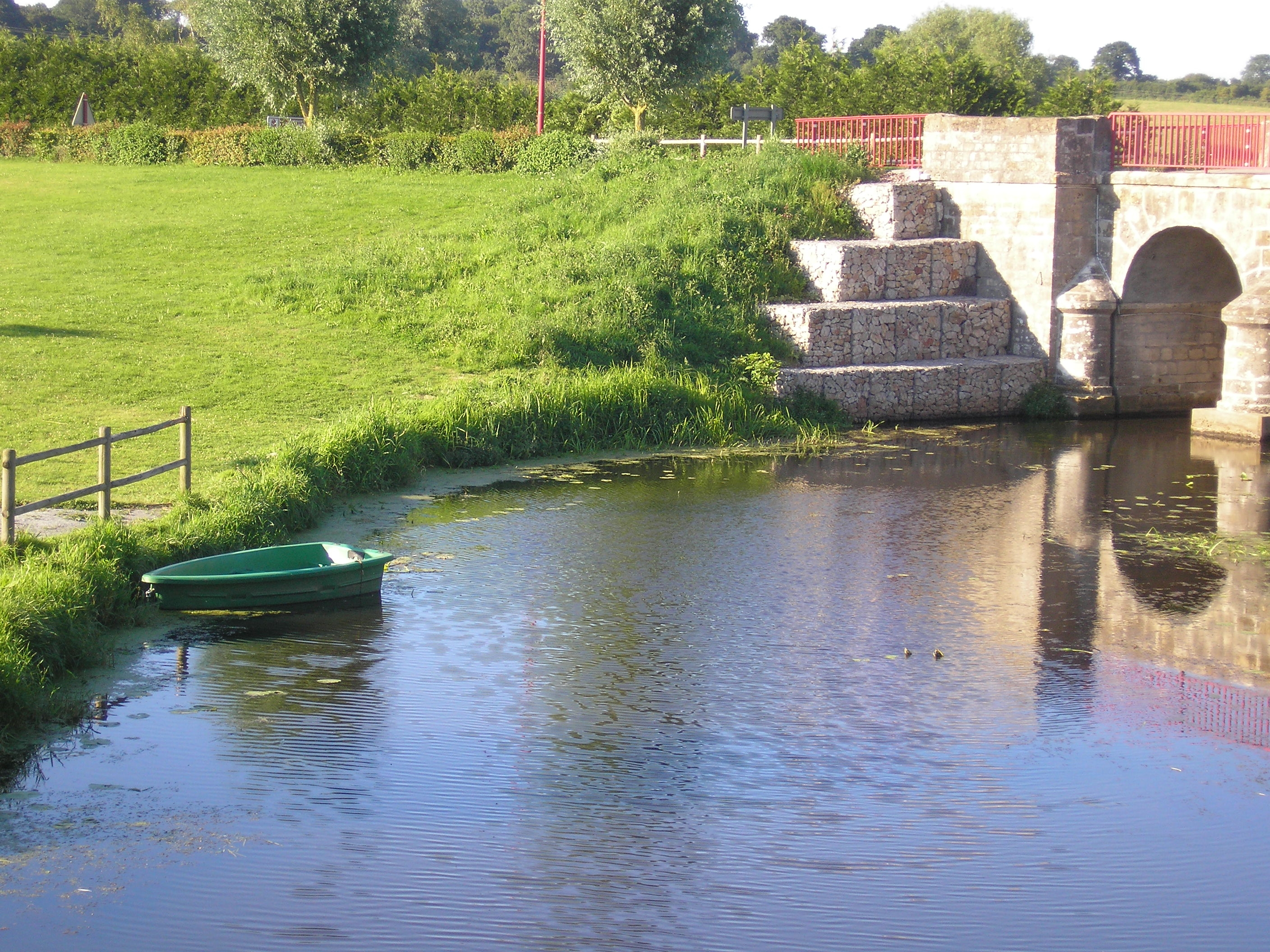 Baupte (Normandie, France). La Sèves.